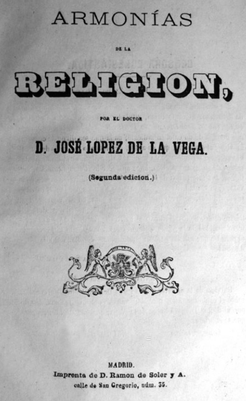 Armonías de la Religión por el doctor D. José López de la Vega (segunda edición.) Madrid. Imprenta de D. Ramón de Soler y A. calle de San Gregorio, núm. 35.